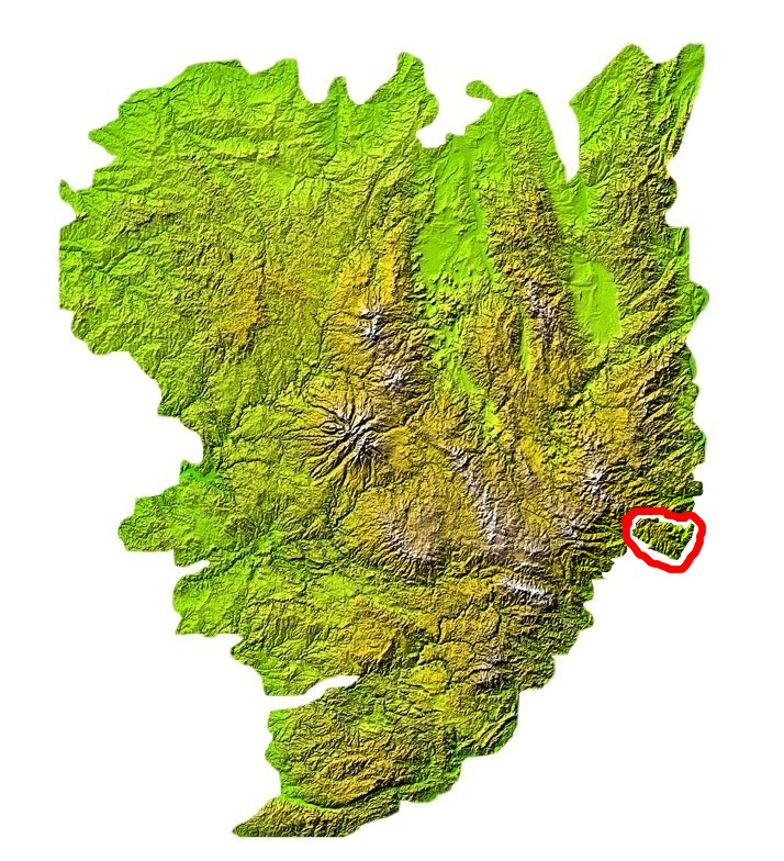 Situation du plateau de Coiron sur la carte du massif central